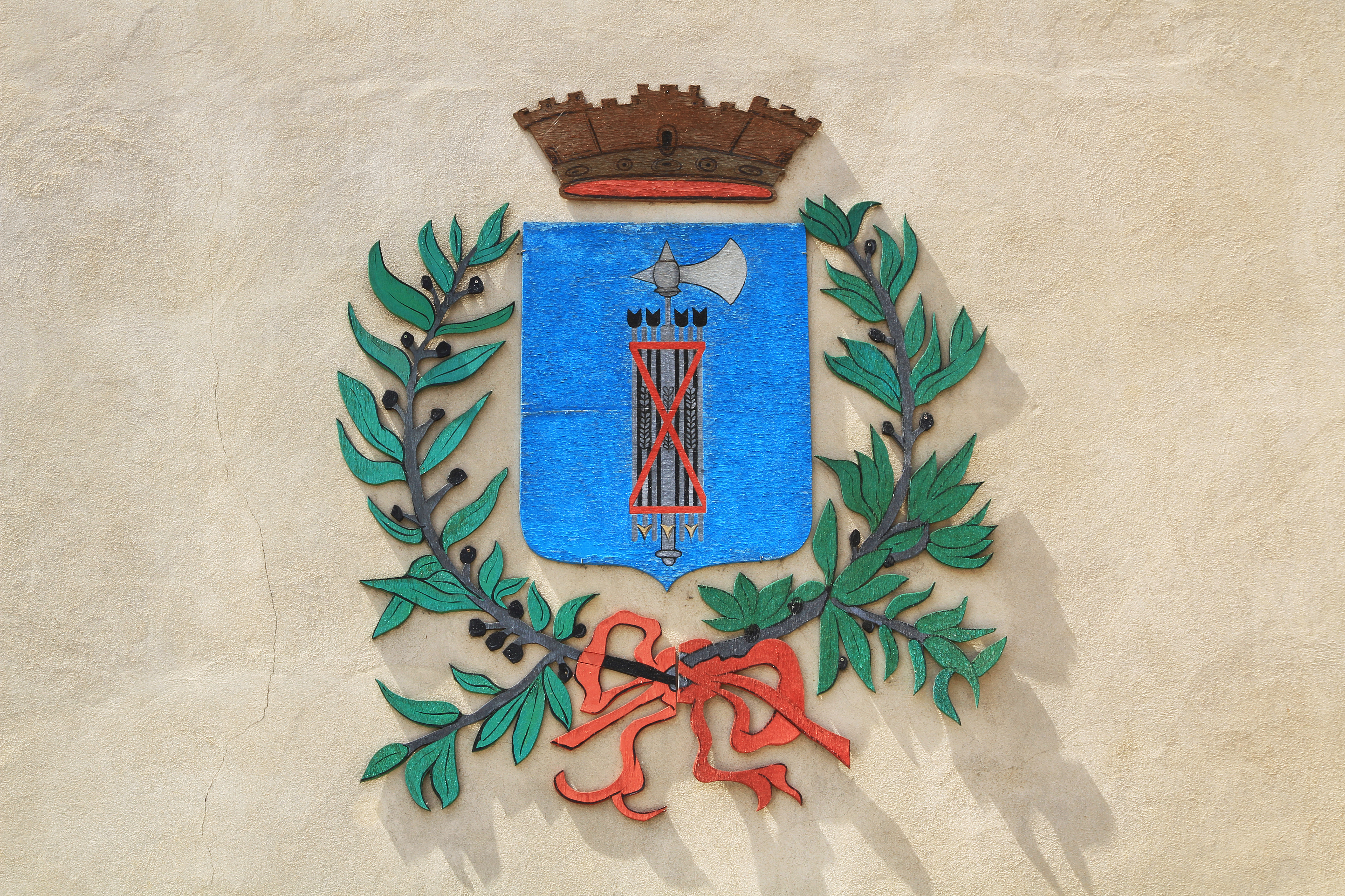 Blason de Vitteaux sur un mur de la ville